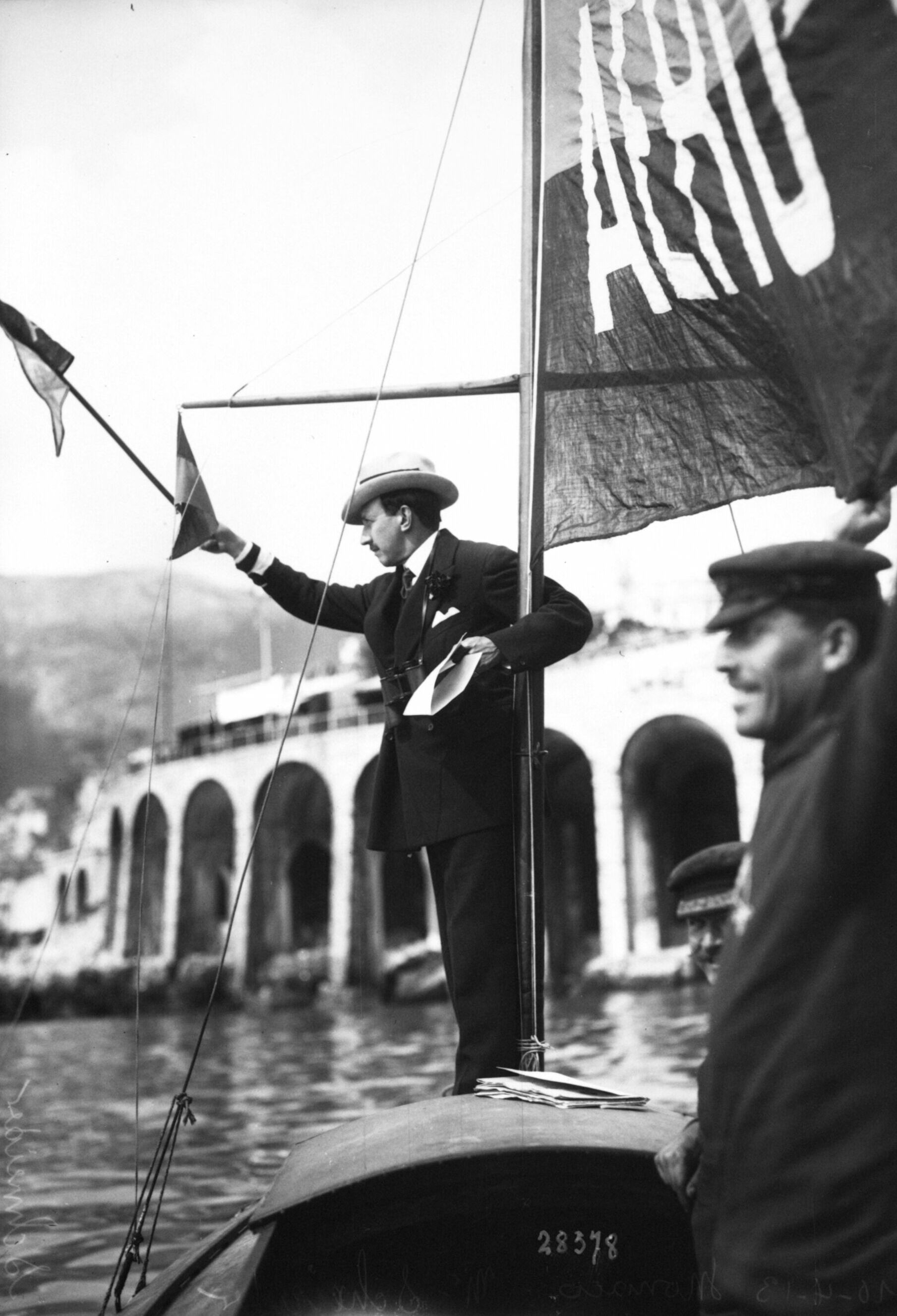 Jacques Schneider debout à l'avant d'un petit voilier donnant le départ d'une course